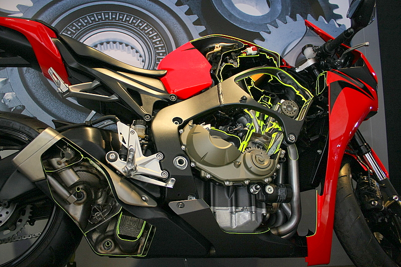 Motorbike cutaway